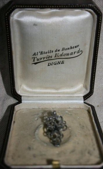 Écrin bijouterie Digne